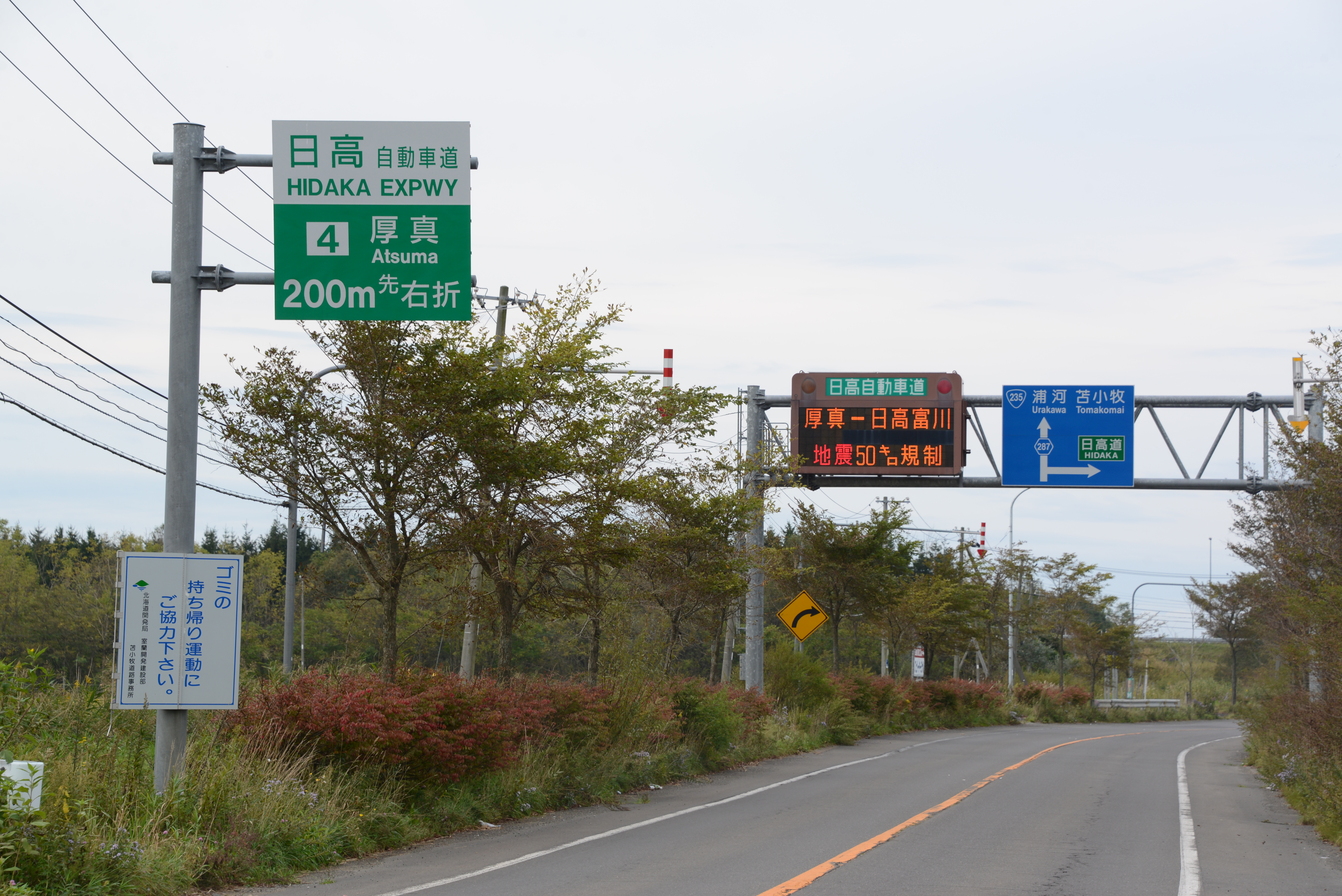 北海道胆振東部地震の影響で道路損壊が生じたため、最高速度を50km/hに制限している。